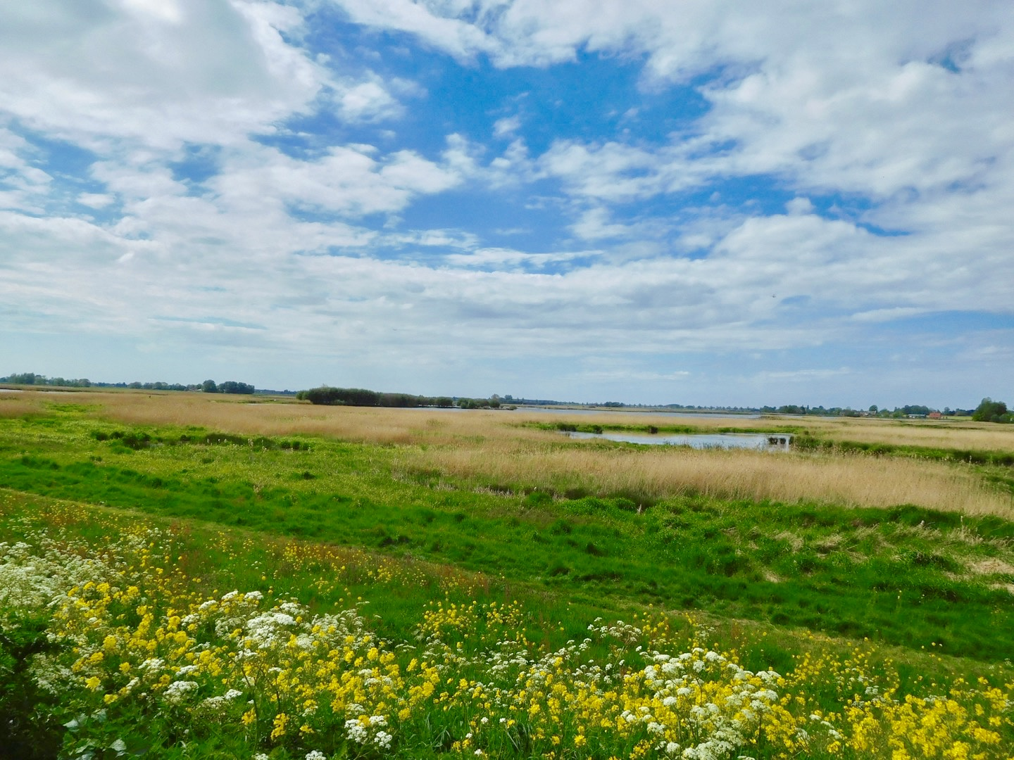 Overzicht over het gebied vanaf de dijk bij parkeerplaats 'de roerdomp'